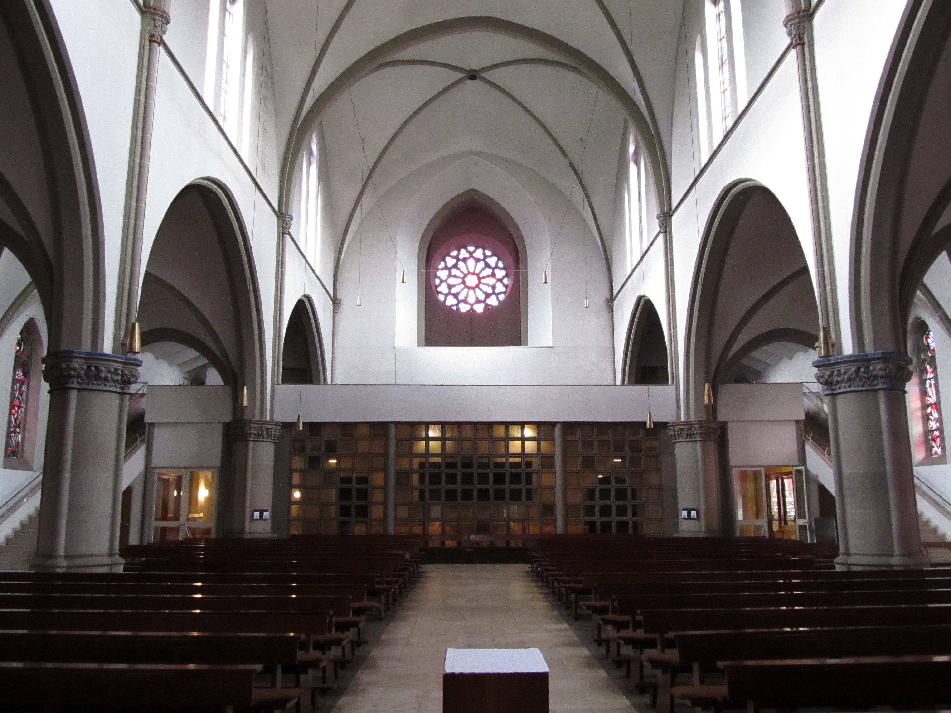 Blick ins Innere der katholischen Pfarrkirche St. Josef in Saarbrücken-Malstatt, Saarland